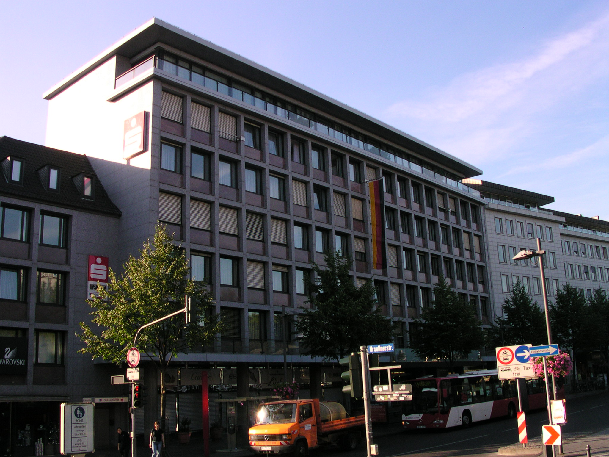 Aachen, Friedrich-Wilhelm-Platz, Gebäude der ehemaligen Kreissparkasse Aachen